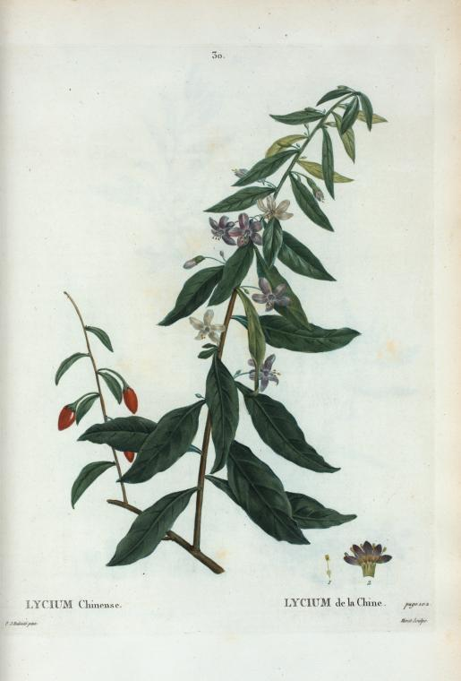 Lycium Chinense = Lycium de la Chine.